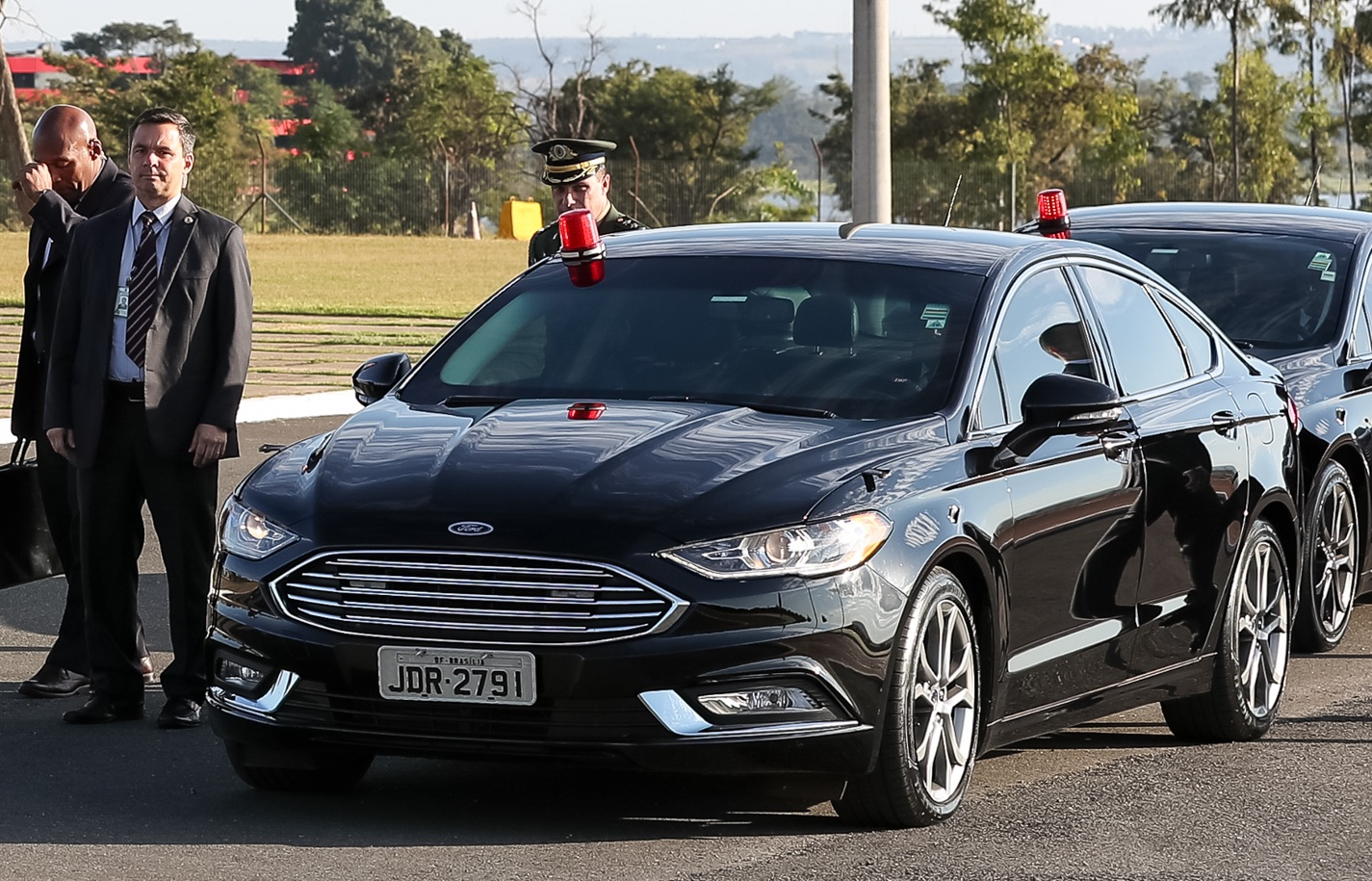 (Brasília - DF, 04/06/2019) Hasteamento da Bandeira Nacional no Palácio do Alvorada.